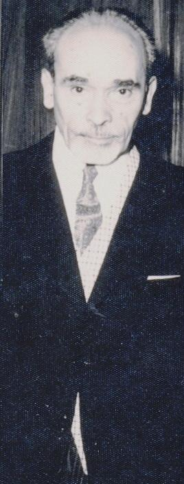 Fotografía de Alberto Hidalgo (circa 1950-1960)